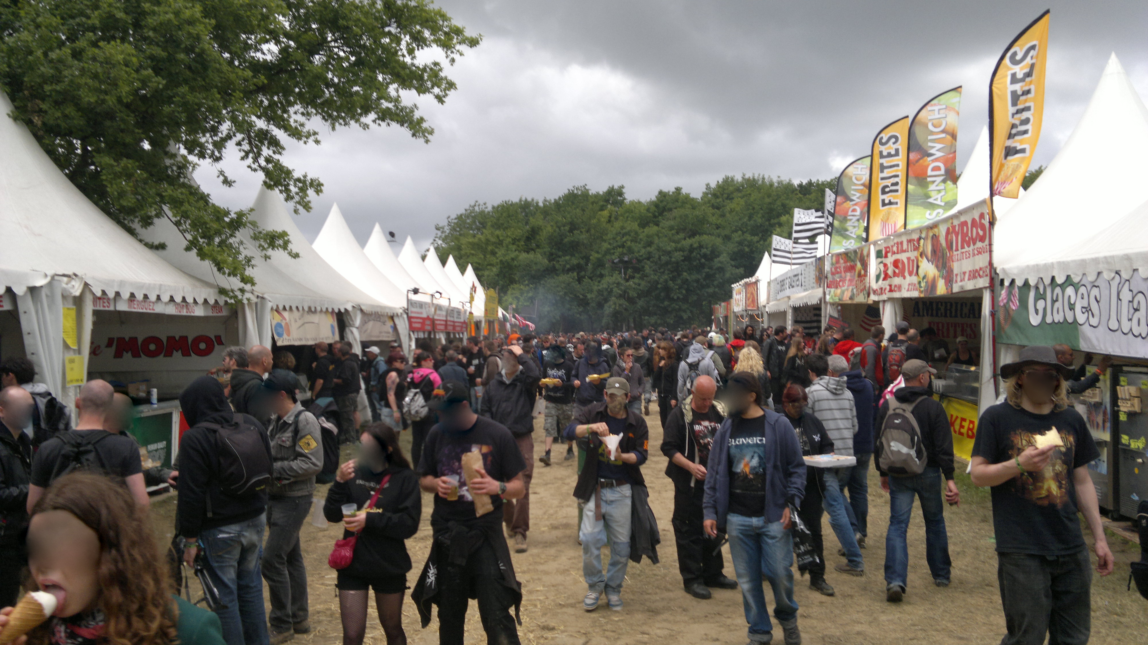 Allée des resto-bars, Hellfest 2013, Fr-44, Clisson.